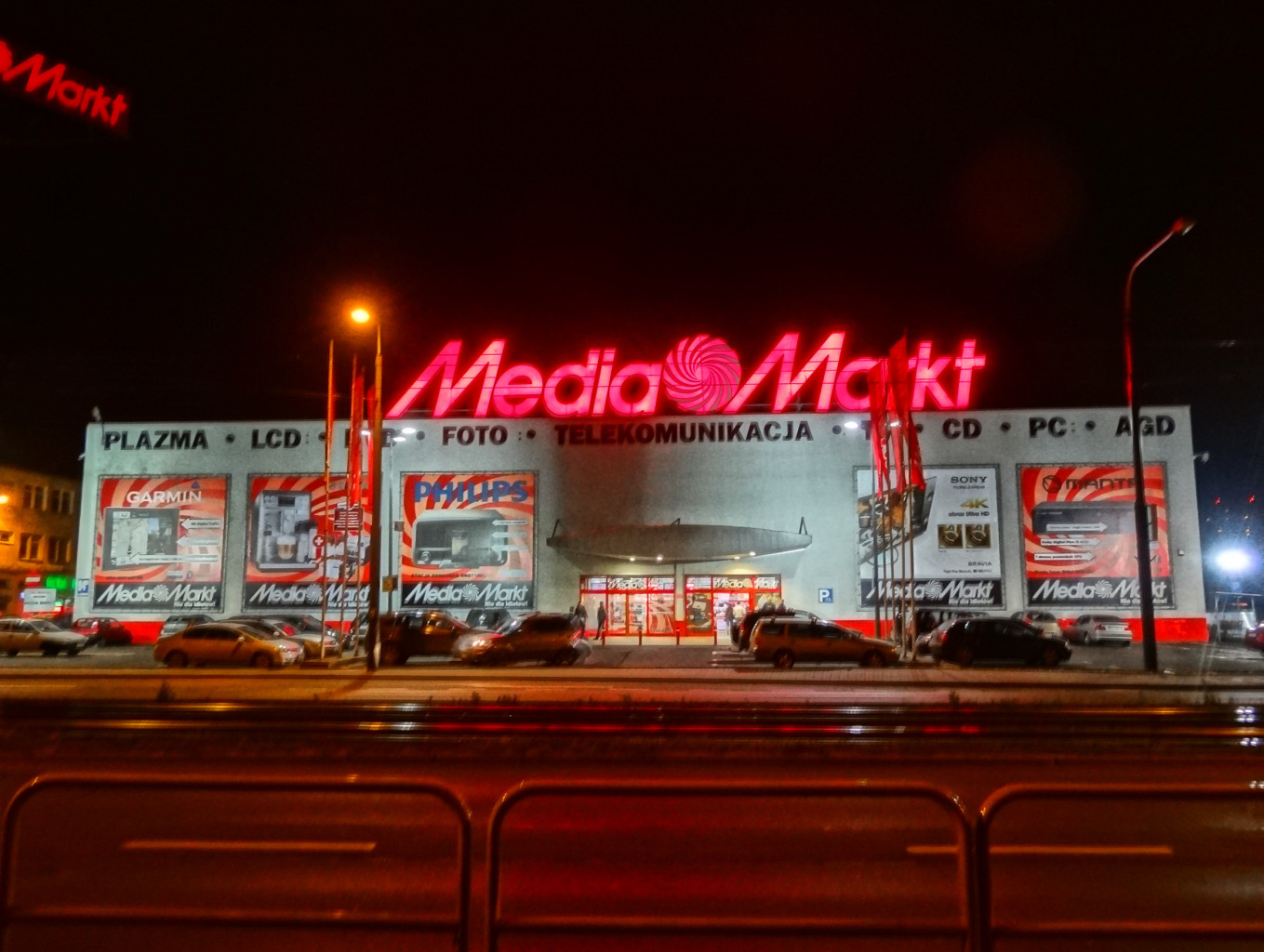 Sklep elektroniczny "Media Markt" przy ul. Jagiellońskiej w Bydgoszczy